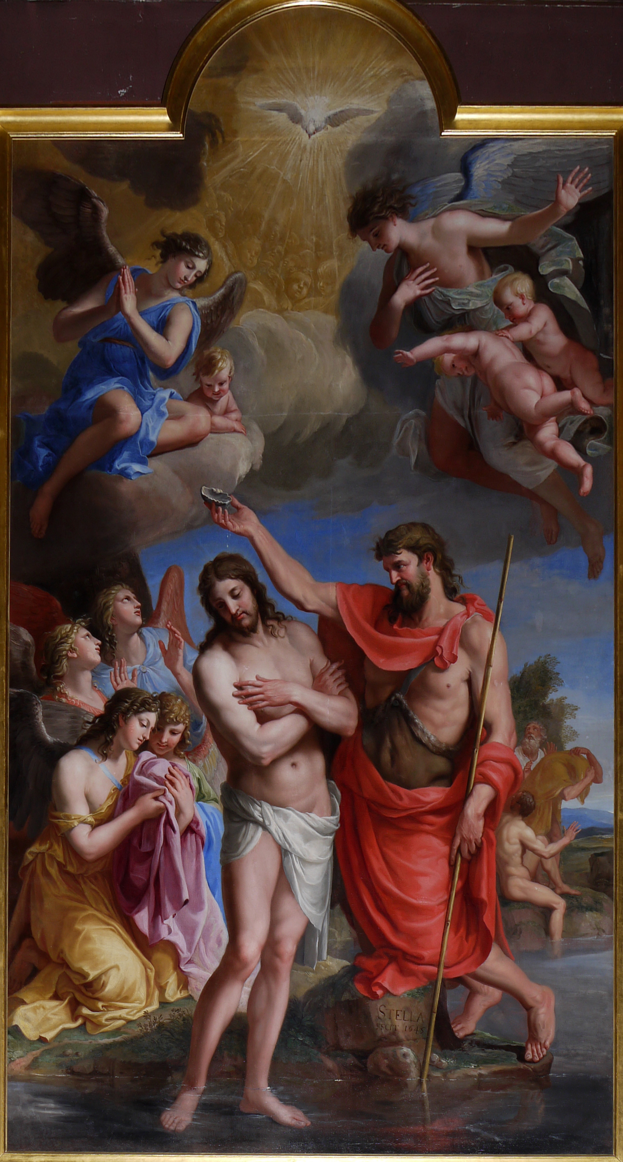 'Le baptème du Christ'